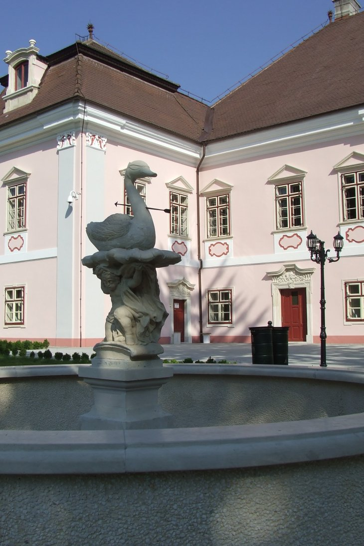 Magna Curia Castle, Deva, Romania